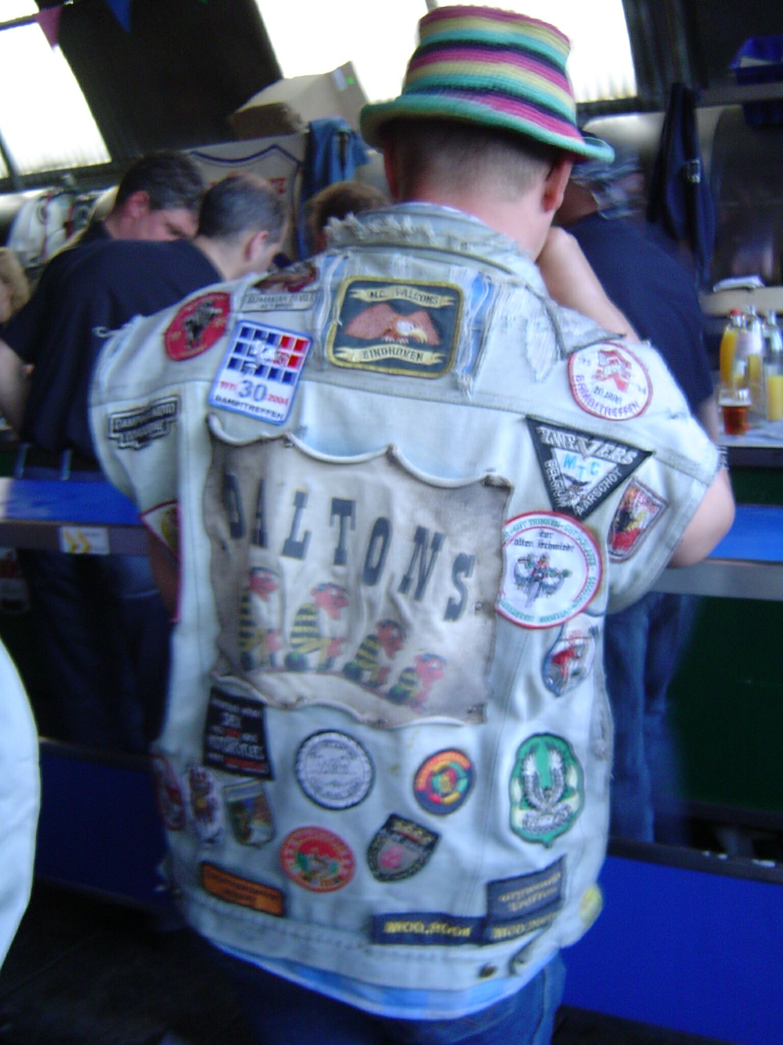 Daltons